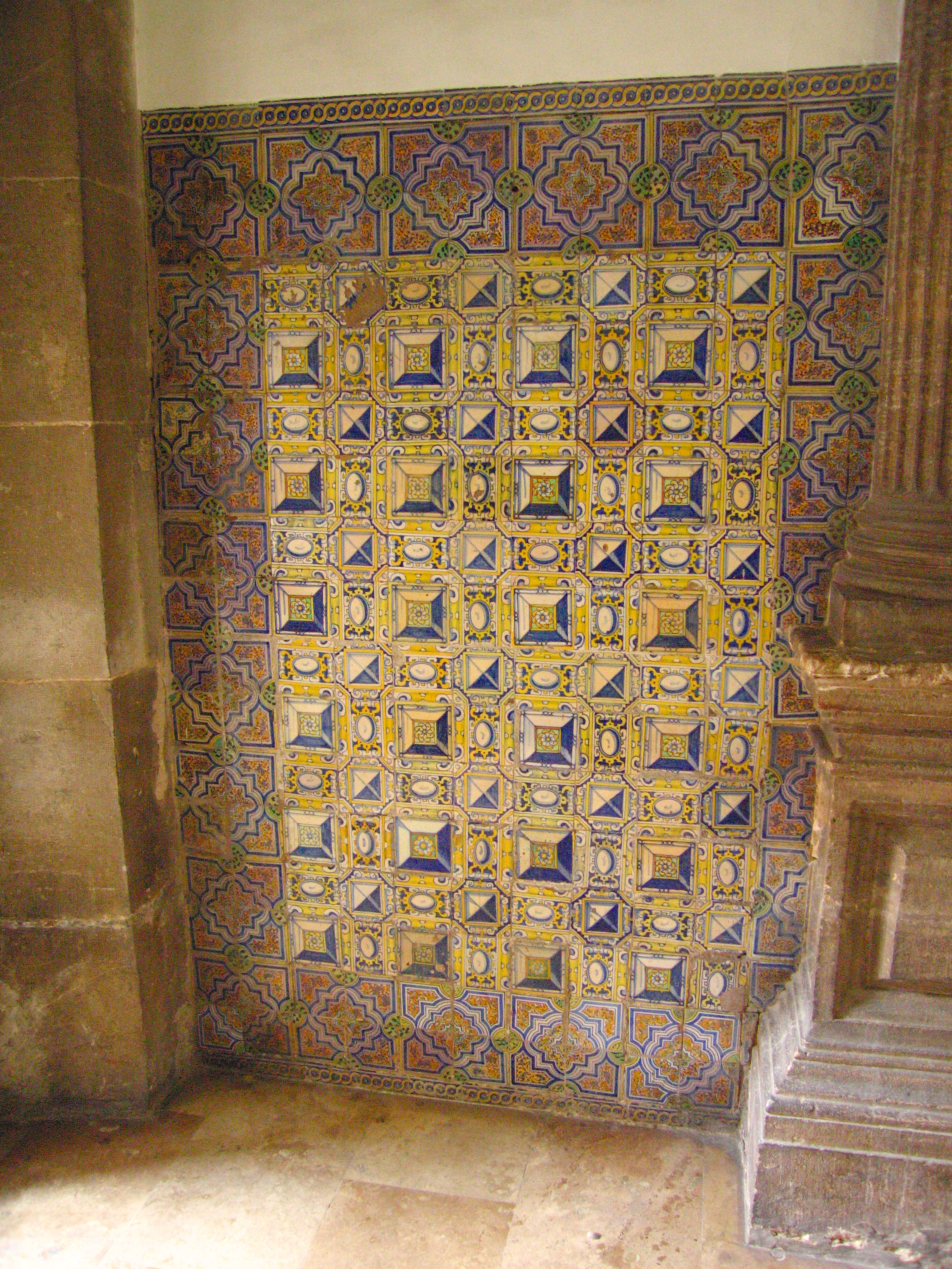 Taulells del Patriarca de València